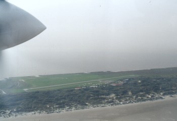 BN-2 im Gegenanflug zum Flugplatz Juist